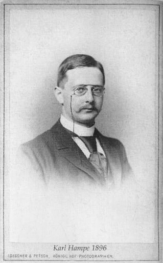 Karl Hampe als junger Wissenschaftle